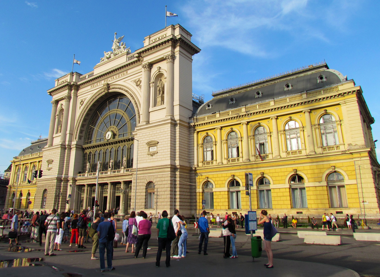 Keleti pályaudvar felvételi épülete (Budapest 8, Baross tér) This is a photo of a monument in Hungary, Identifier: 18151